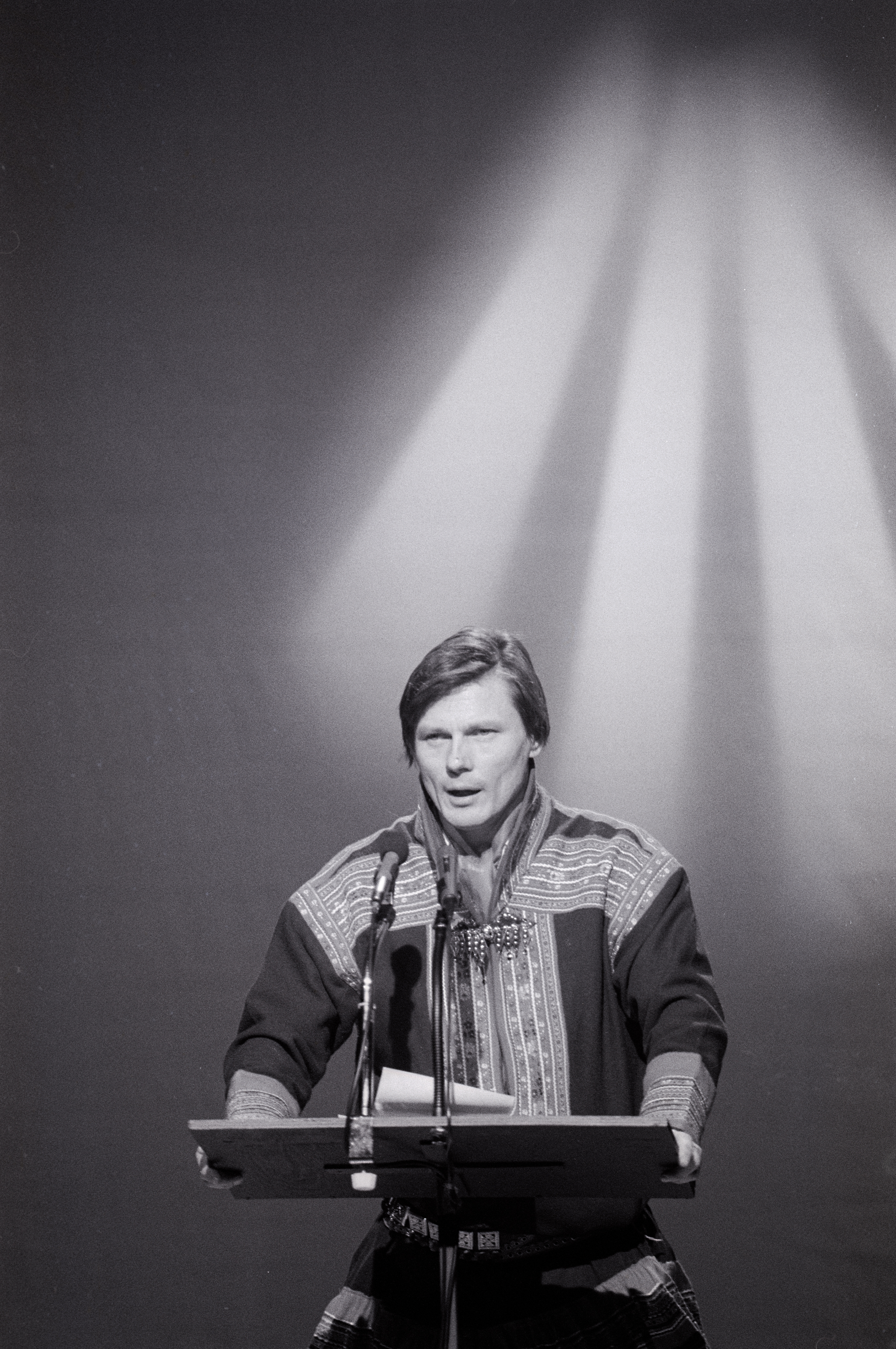 Sametingspresident Ole Henrik Magga taler til Sametinget og til Dalai Lama i forbindelse med hans besøk etter mottak av Nobels fredspris i 1989. Foto: Harry johansen.